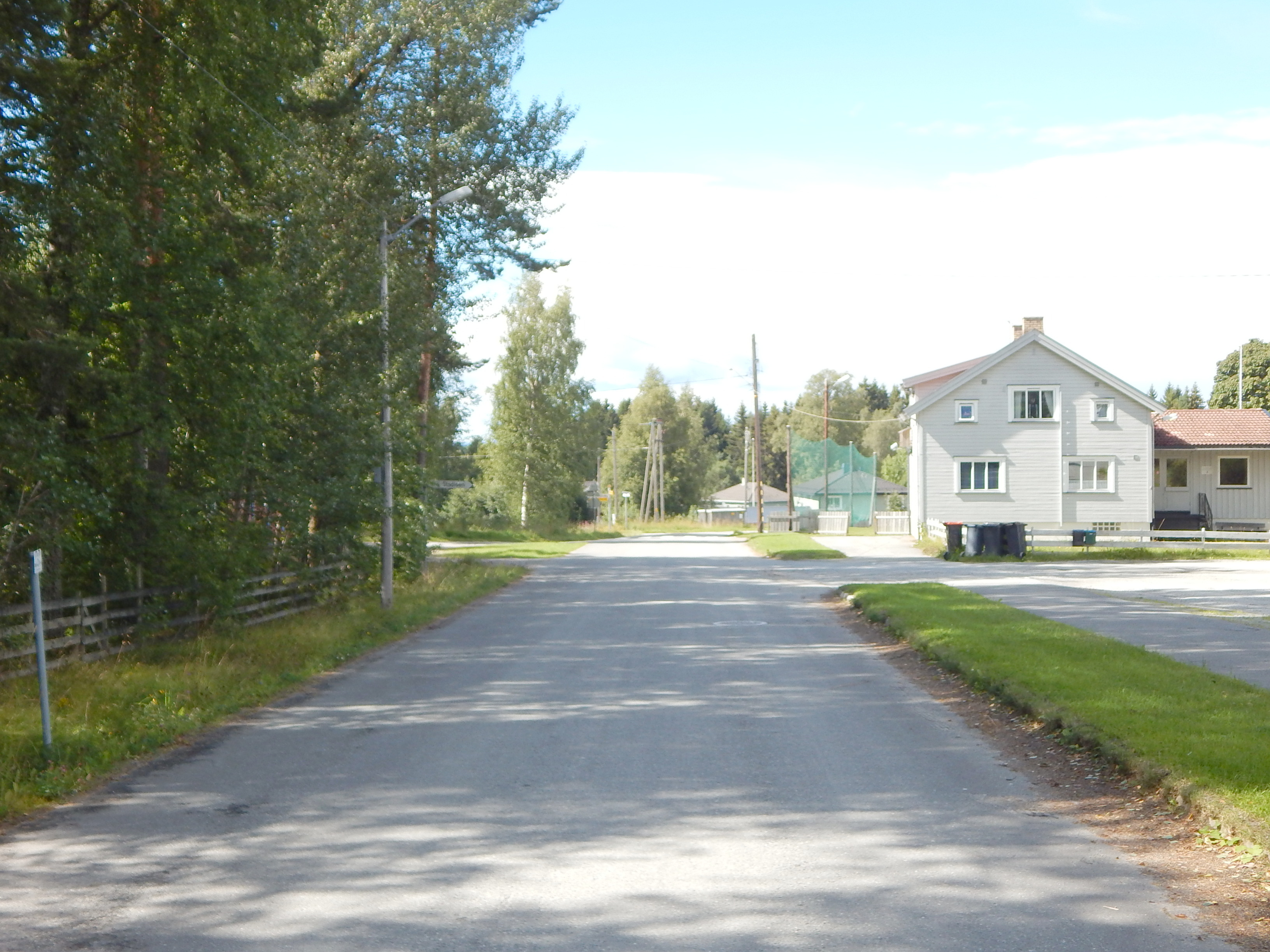 Sjøvegen (fylkesvei 1918, tidl. 240) vestover mot Åsbygda (Hekne) sentrum